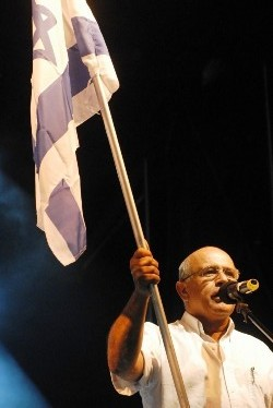 יו"ר האגודה למען החייל, אביגדור קהלני, בפסטיבל המתגייסים